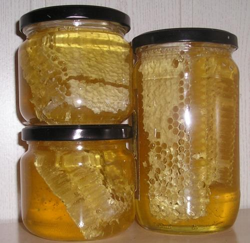 Med u saću